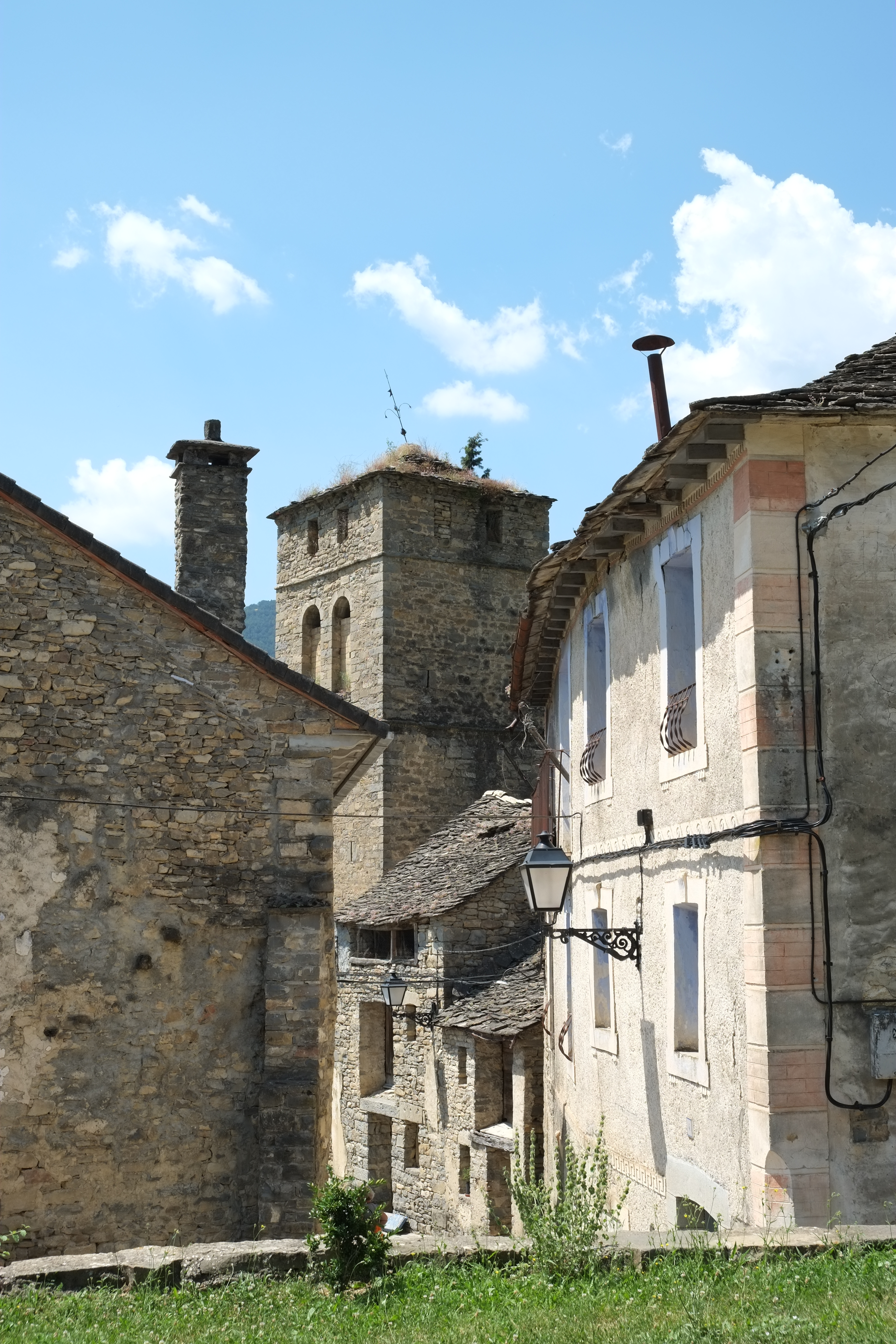 Javierre de Aral in Aragonien (Spanien)